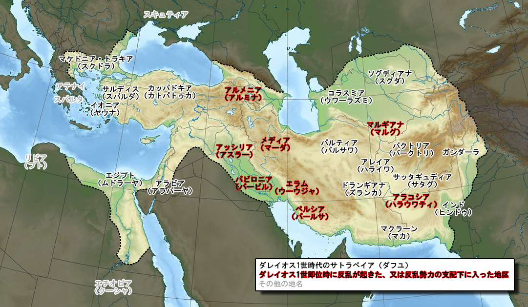 ダレイオス1世時代のアケメネス朝の地方名